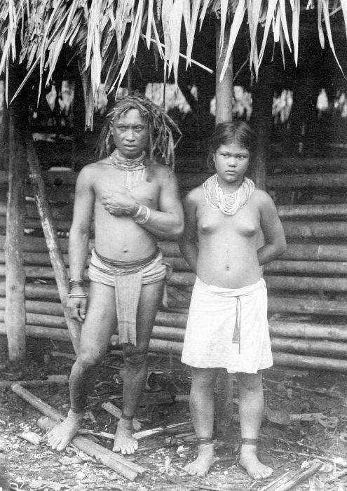 Repronegatief. Een echtpaar van de Pagai-eilanden